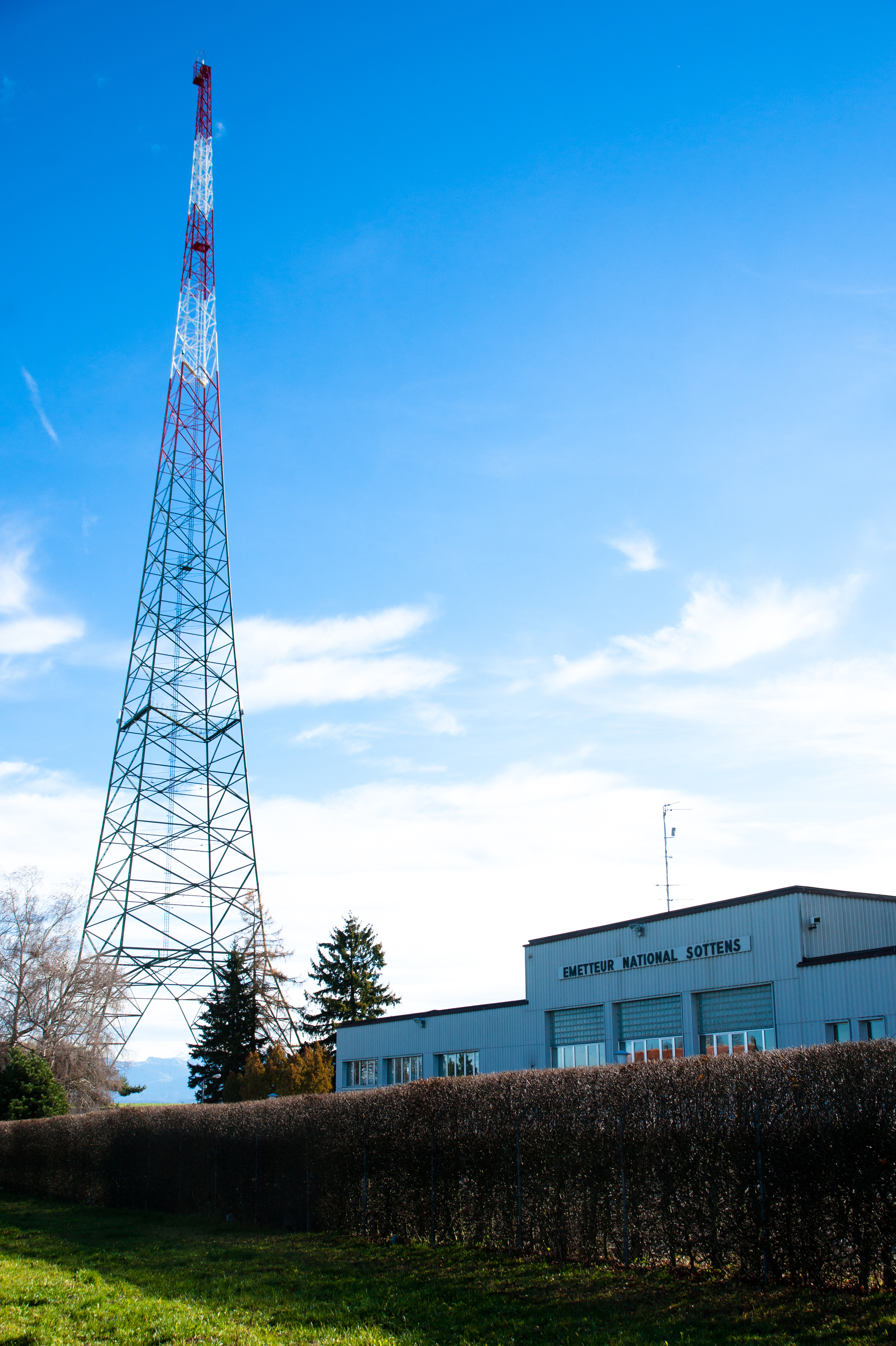 Antenne de Sottens